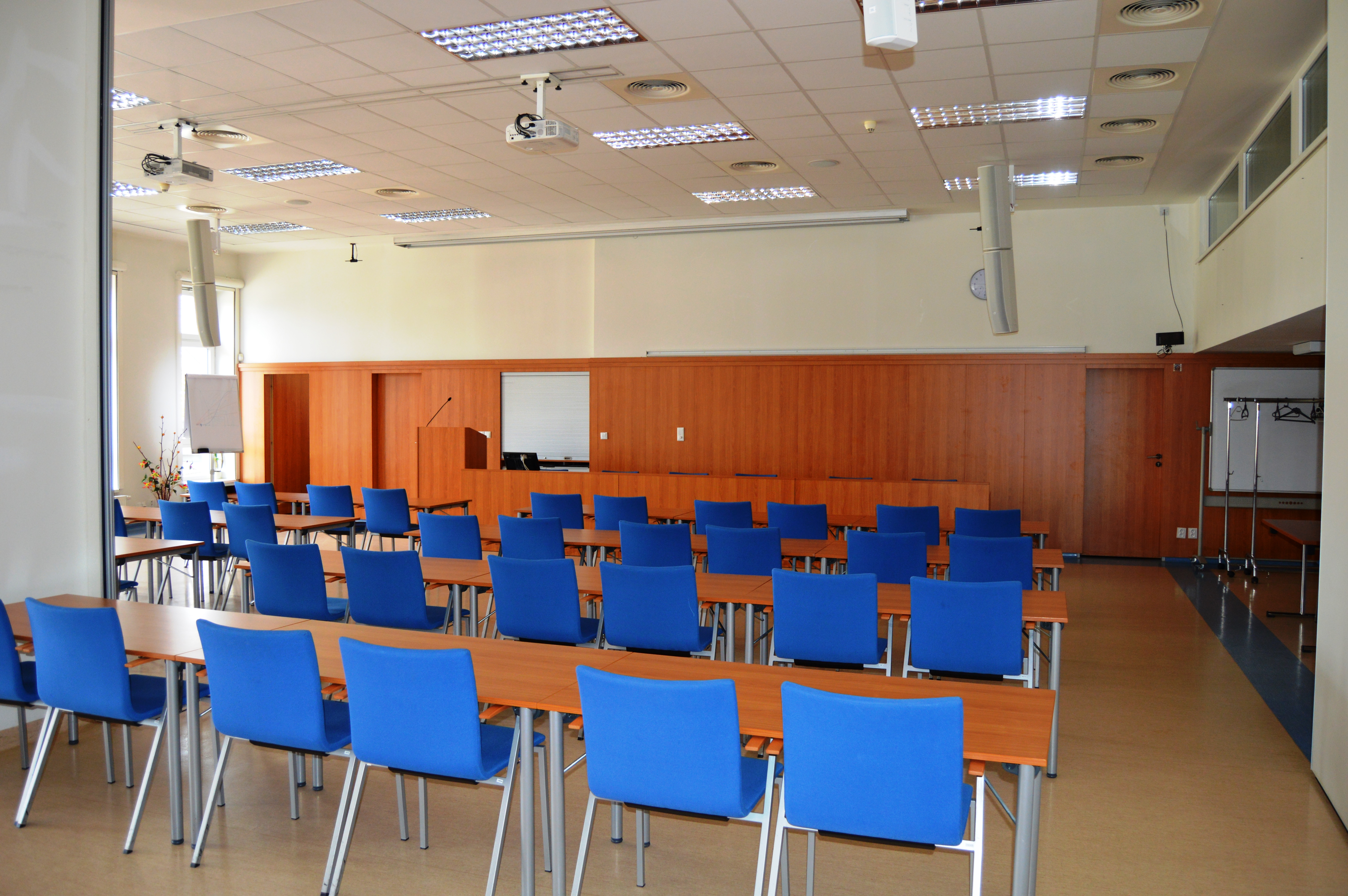 Multifunkční společenský sál.